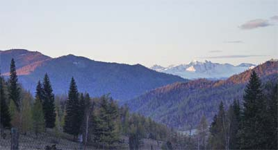 Панорама из д.Бархатово Онгудайского района, вид на северный склон Теректинского хребта (расстояние до хребта примерно 70 км). Качество снимка значительно снижено